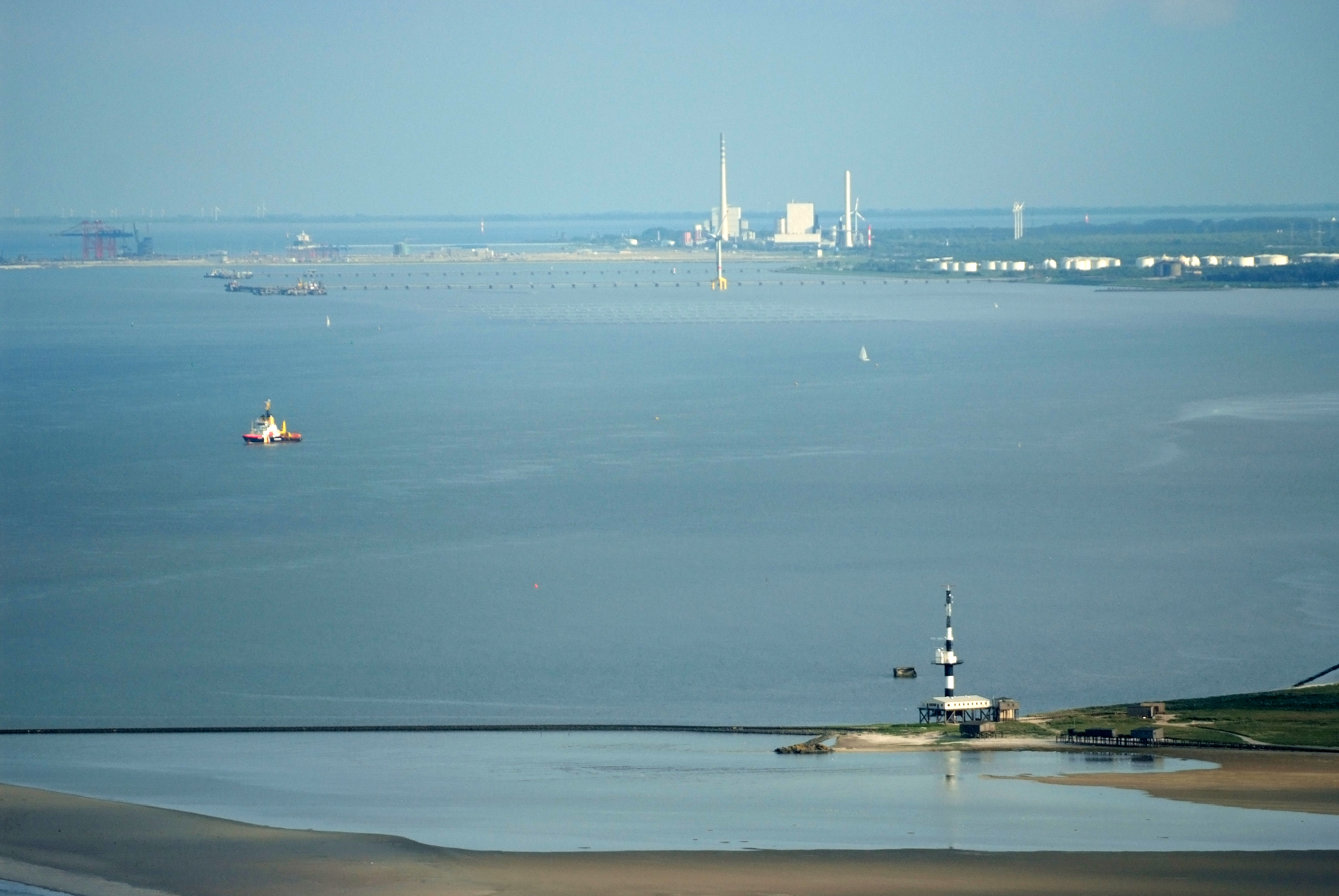 Blick von Minsener Oog (Radarturm) in Richtung Süden über die Außenjade und die Innenjade bis zum Südufer des Jadebusens (Fotoflug vom Flugplatz Nordholz-Spieka über Bremerhaven, Wilhelmshaven und die Ostfriesischen Inseln bis Borkum)